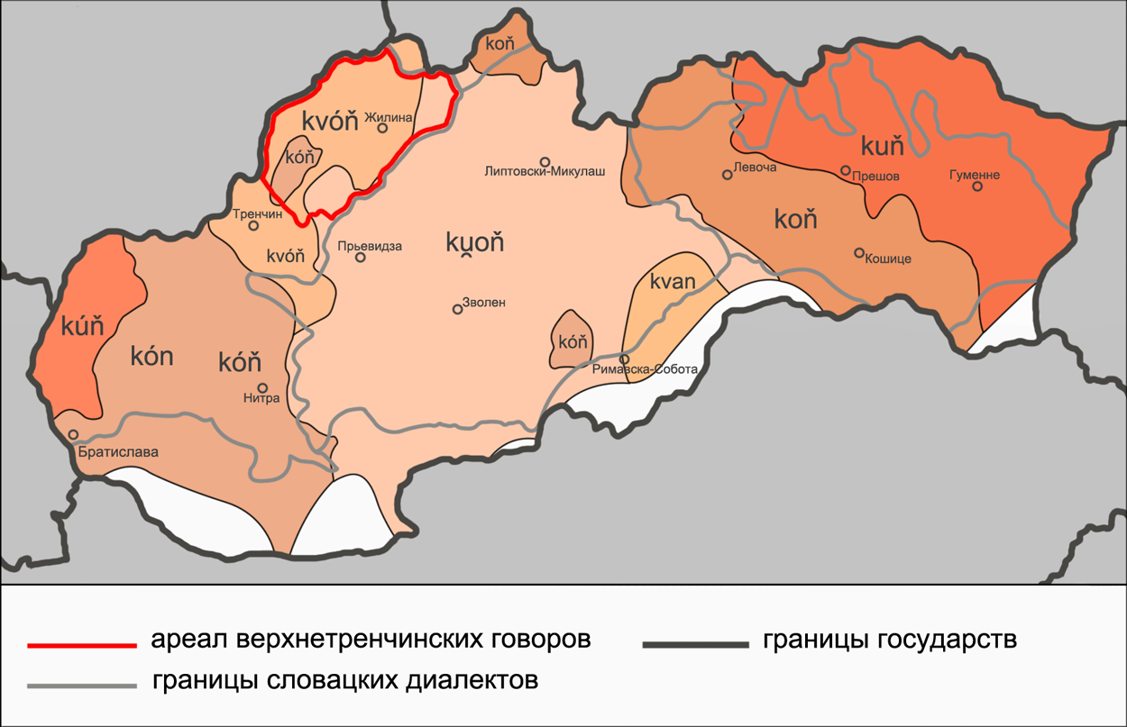 Континуанты ō в словацких диалектах (c указанием верхнетренчинского ареала) на примере слова kôň. Источники: Pauliny E. Fonologický vývin slovenčiny. — Bratislava: Slovenské pedagogické nakladateľstvo, 1963. — 360 S. — s. 222